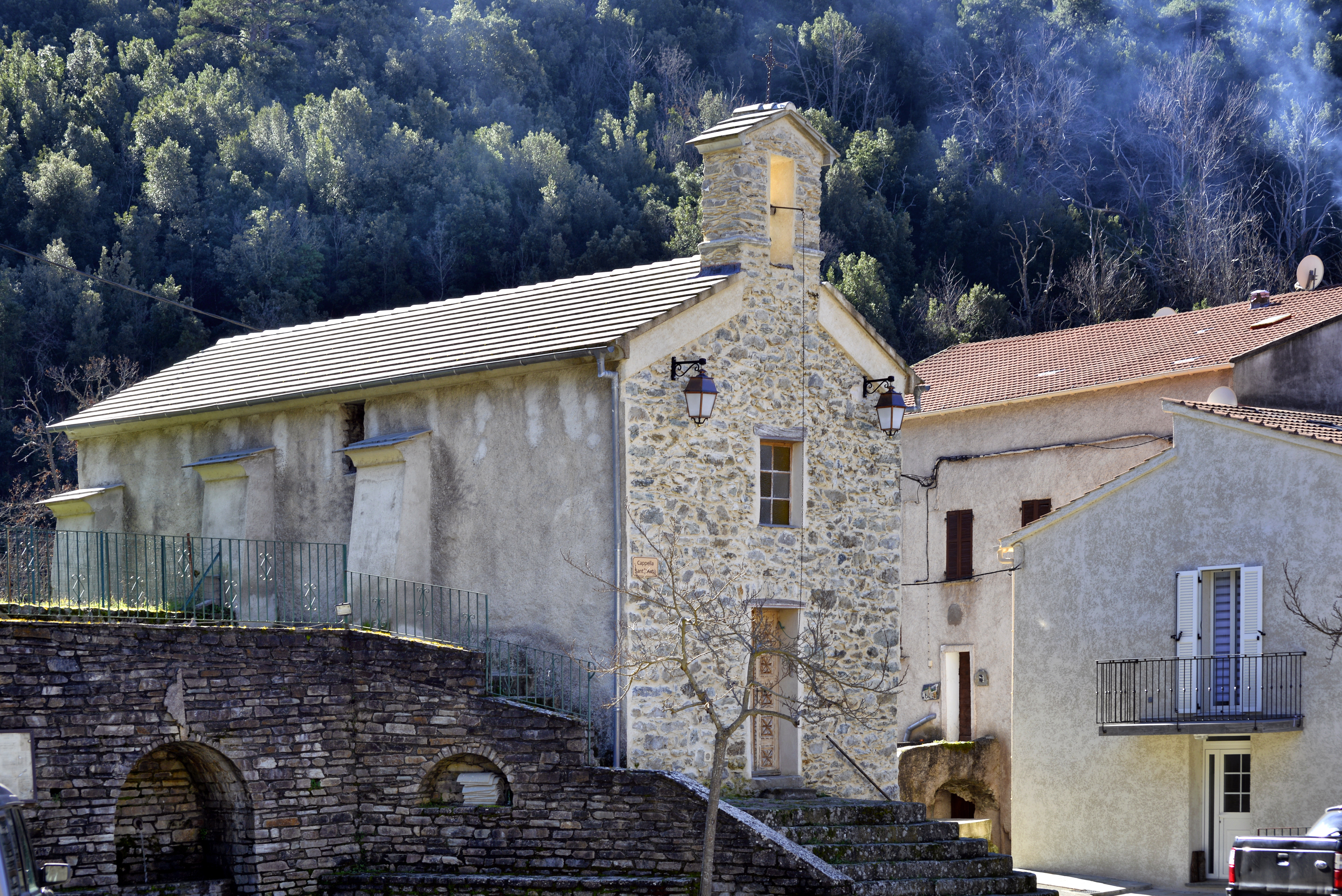 Santa-Lucia-di-Mercurio, Bozio (Haute-Corse) - Chapelle Saint-Antoine (cappella Sant' Antò) au hameau de Piedivaldo (Pian di Vallu), sous le village.